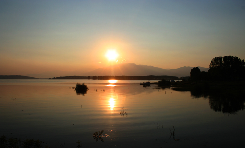 Залез на яз.Копринка